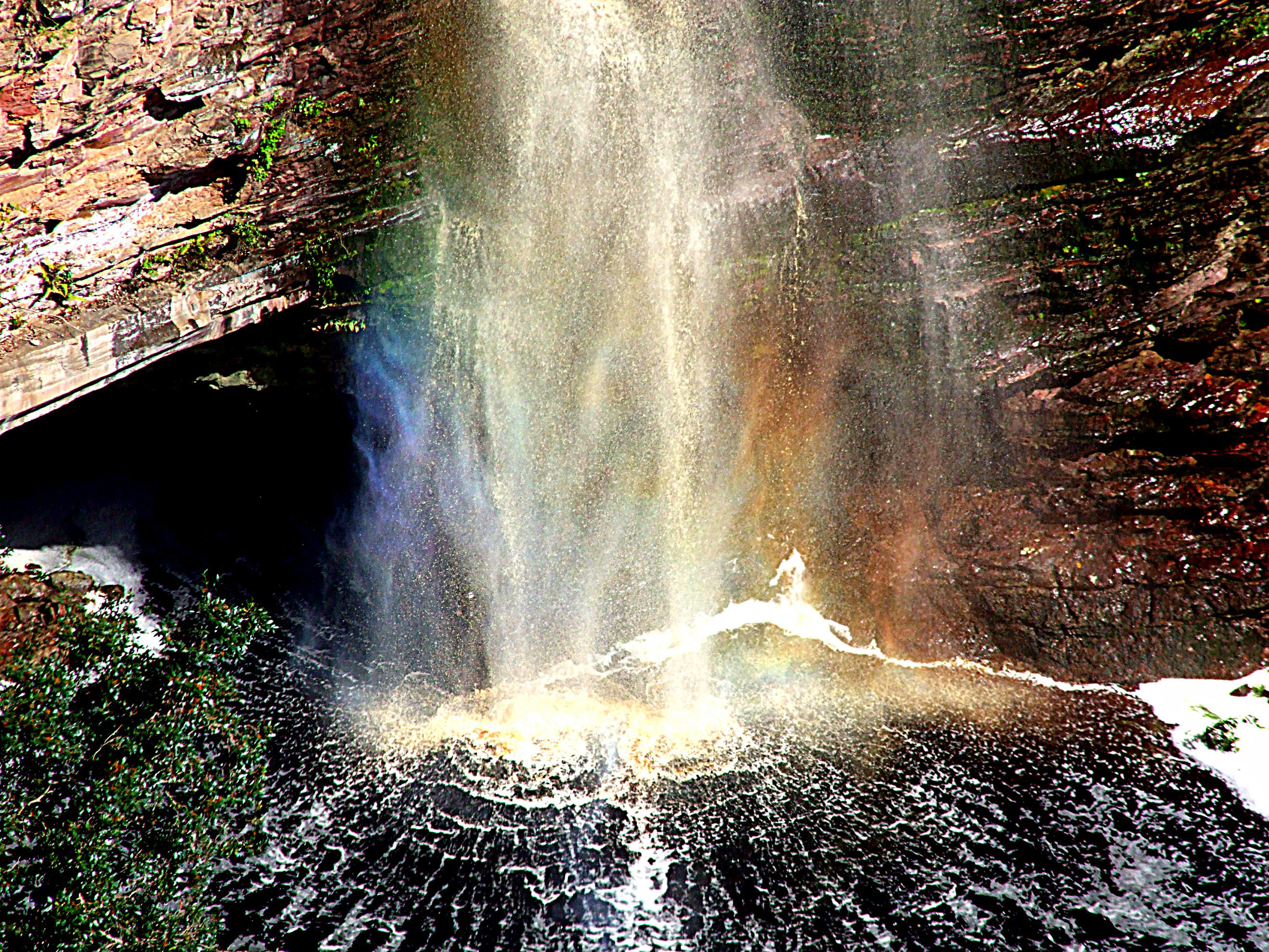 Poucos metros após a nascente, o Rio Jacuípe despenca de uma altura de 119 metros, formando a Cachoeira do Ferro Doido. Em sua corrida para os braços do mar, passeia pelo sertão baiano, distribuindo vida.